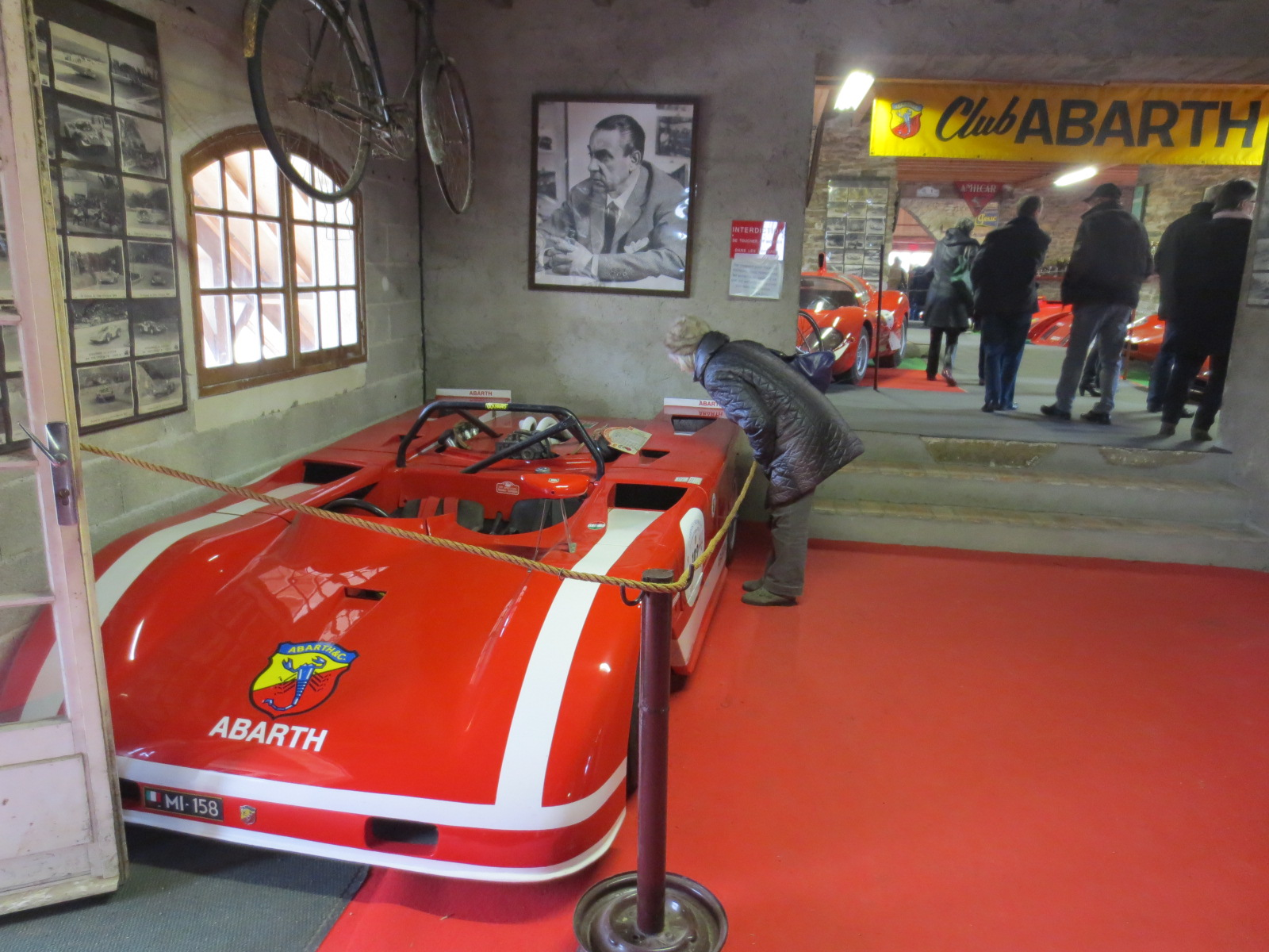 Musée Abarth de Savigny-lès-Beaune